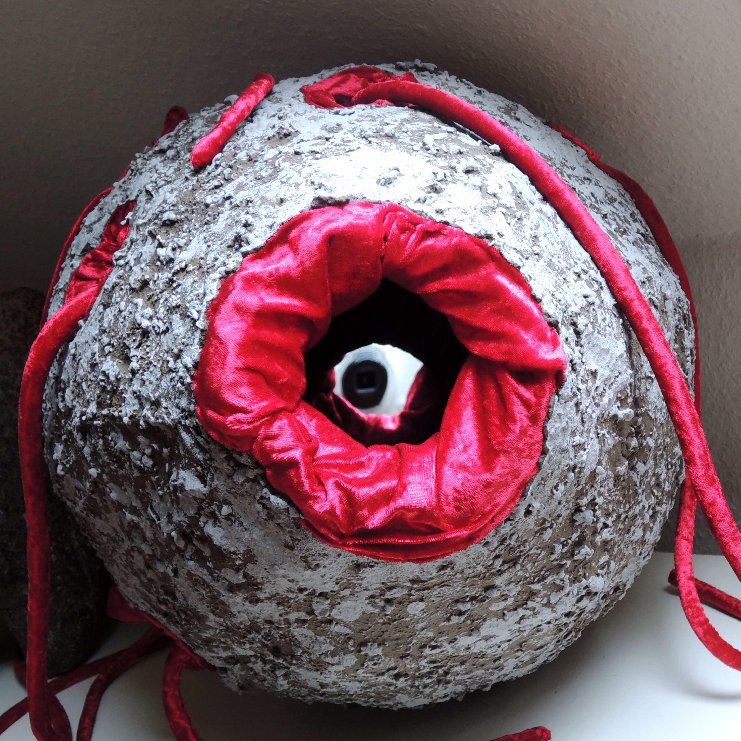 Birgit Kahle 'Eye spy' 2013 Birgit Kahle (1957–) DescriptionGerman artistDate of birth 1957 Location of birth Cologne Work period1980-Work location Germany, ItalyAuthority control : Q28736363 VIAF: 10472521 ISNI: 0000 0001 0777 1498 ULAN: 500115319 LCCN: nr96017659 GND: 171939824 WorldCat creator QS:P170,Q28736363